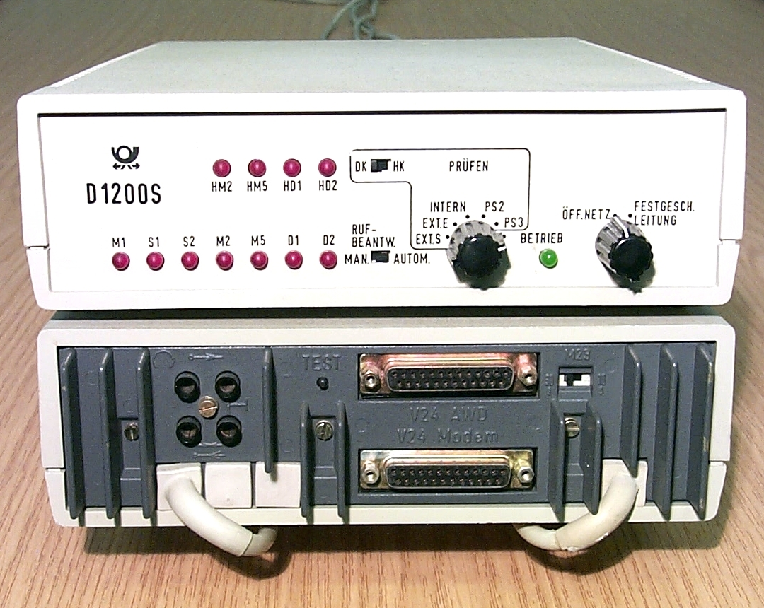 Modem mit Hilfskanal/Backward Channel/Secondary Channel Modem mit integriertem Wählautomaten /automatic calling equipment Modemhersteller: SEL Bezeichnung SEL: Modem 2013 Bezeichnung DBP: D1200S-04 Beigelegte Kurz-Bedienungsanleitung: April 1980 Modem-Baujahr: 01/85 Autor: Ich selbst